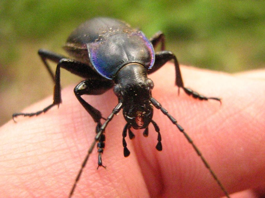 Die Goldleiste - Carabus violaceus ist ein Laufkäfer